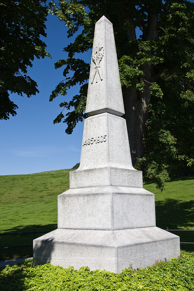 Schlacht-Denkmal auf dem Stoss (Kanton AR)